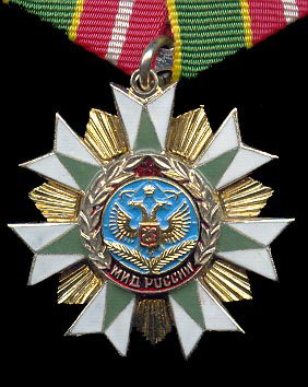 Нагрудный знак МИД России «За вклад в международное сотрудничество»